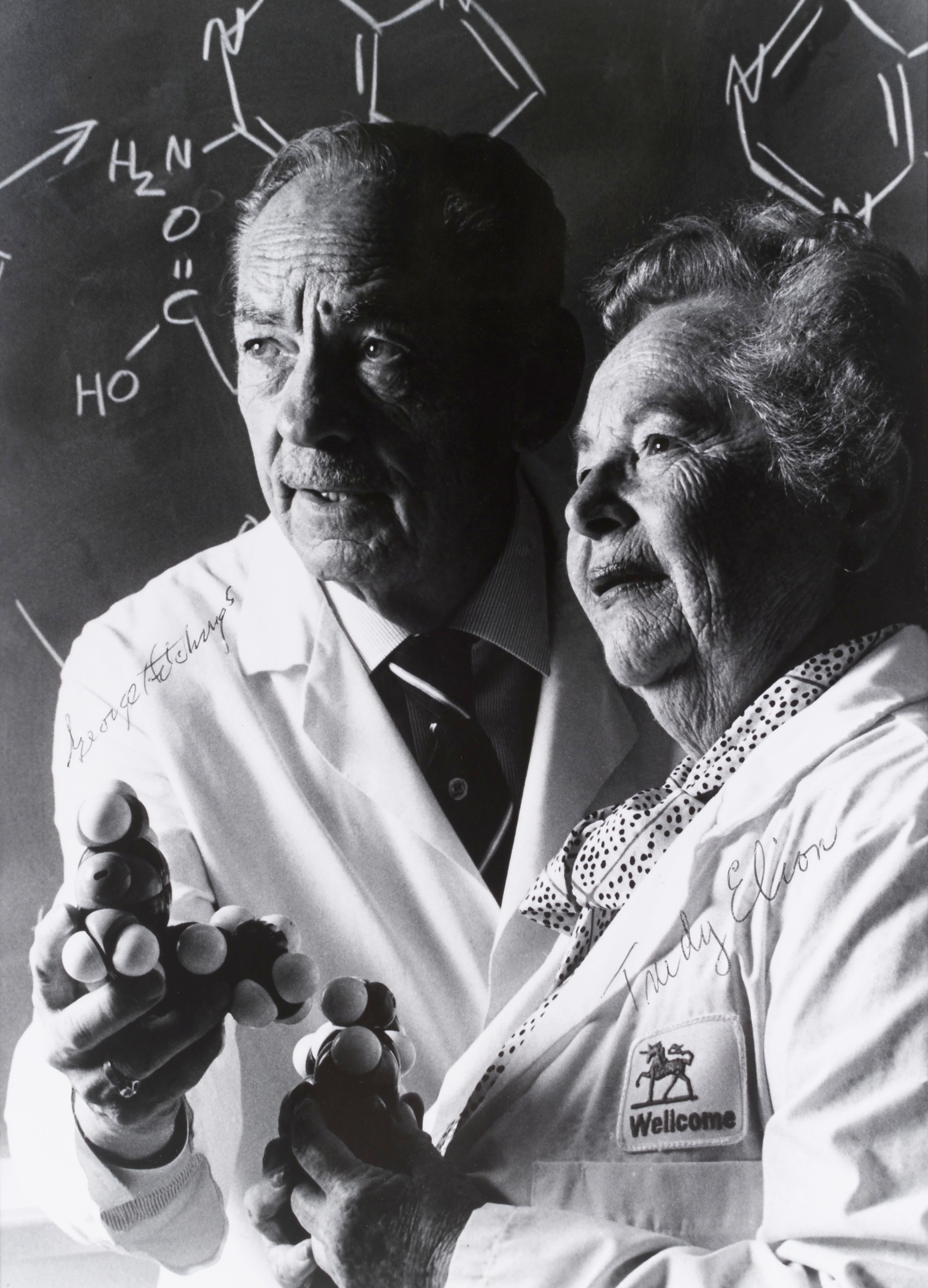 Nobel Prize winners, Dr Hitchings and Dr Elion